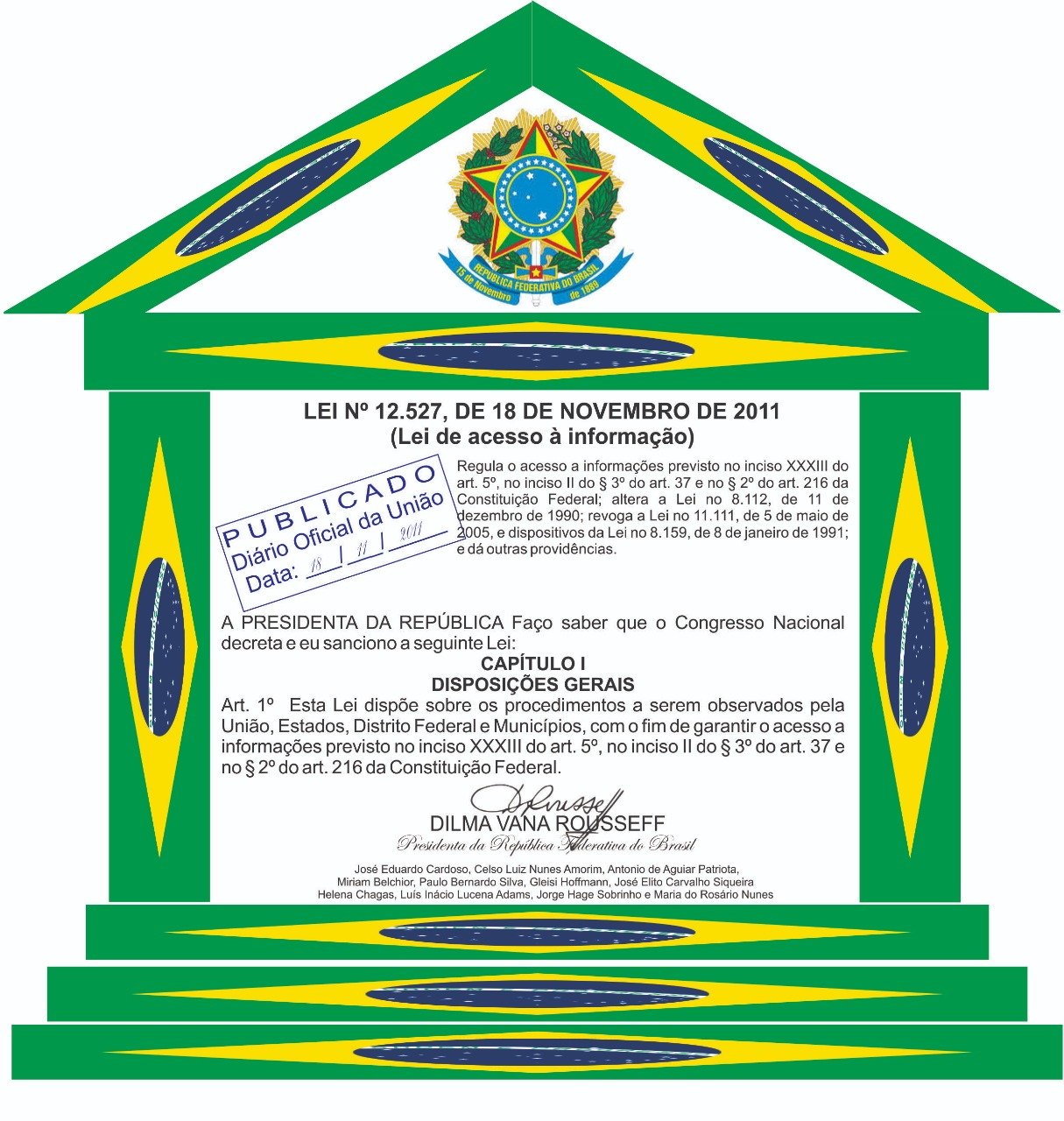 Placa em formato de pórtico com ornagem cívica com parte preambular(inicial) da atual Lei de Acesso a Informação do Brasil. Nota-se que há, em letras azuis a expressão PUBLICADO, isto quer dizer que a lei original foi publicada no Diário Oficial da União, assim, o que foi publicado foi a original e não essa placa da parte inicial da referida lei.